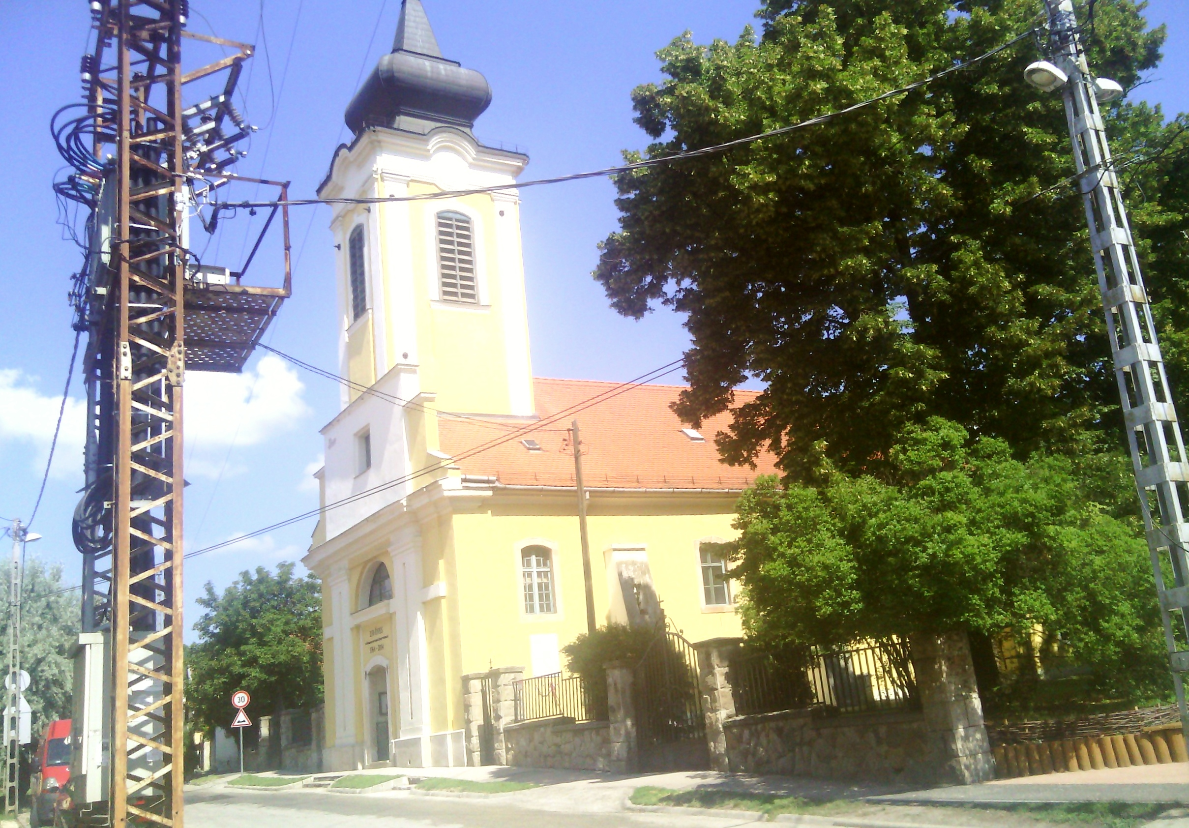 Szent József-templom, Békásmegyer-Ófalu